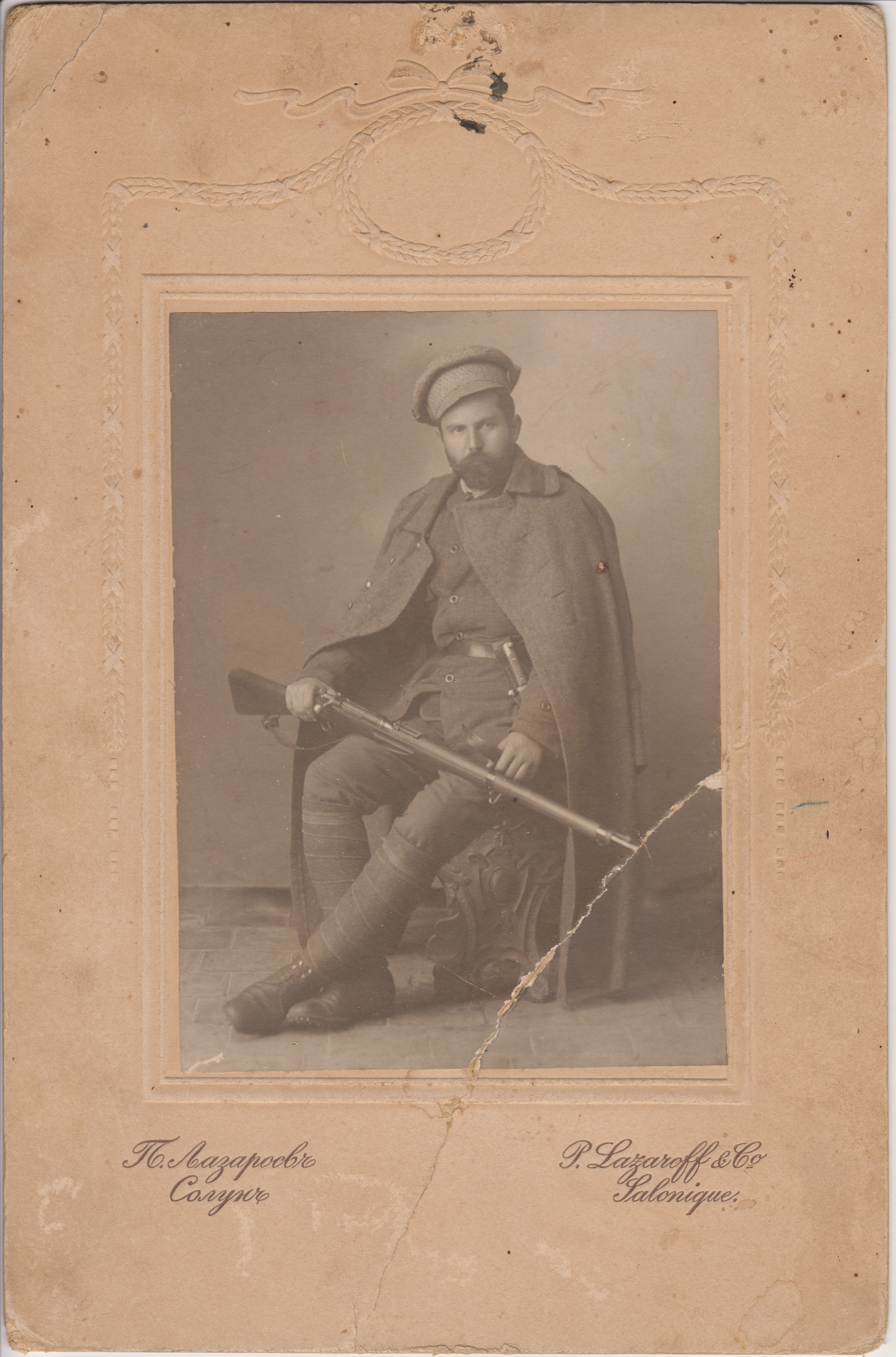 Добри Данев Манасиев, сниман в Солун